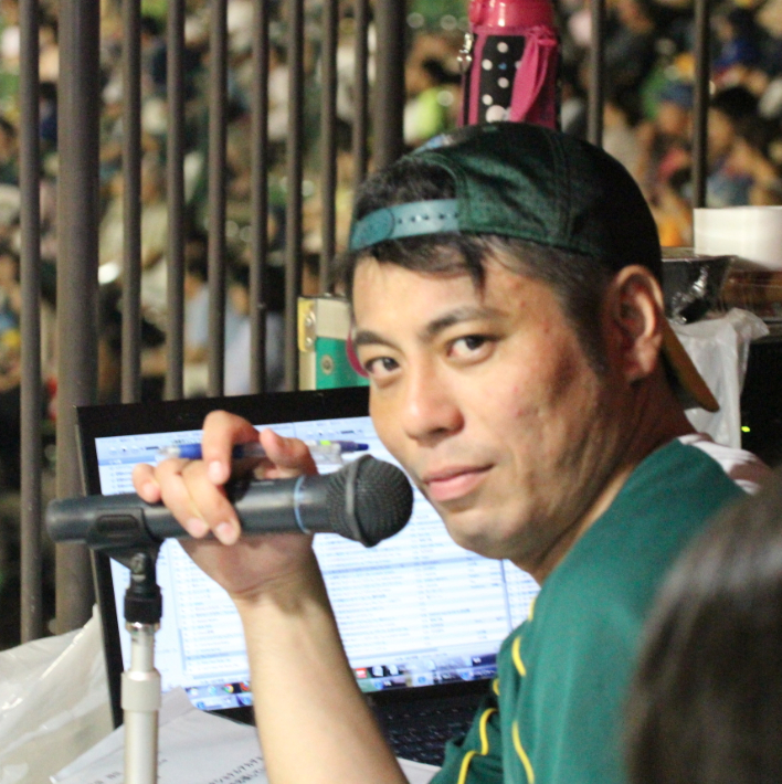 2013.8.17 レクザムスタジアム